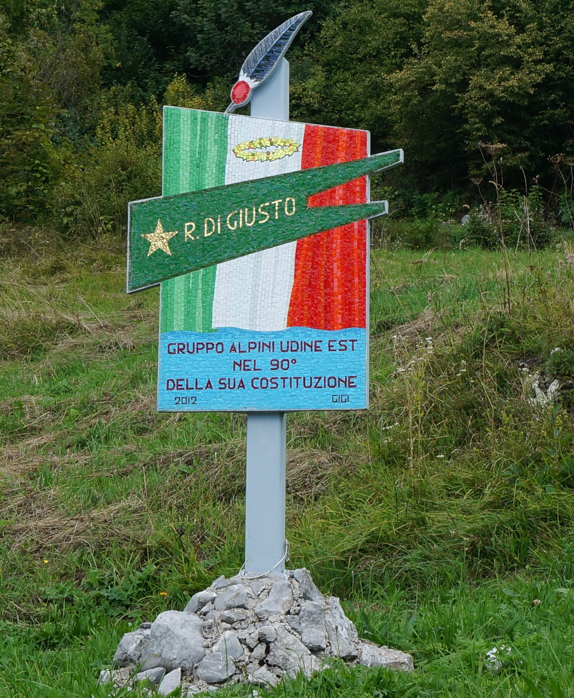 Denkmal Riccardo Giusto (1895–1915) am Pass Solarie (960 m) bei Drenchia in der Provinz Udine, Italien